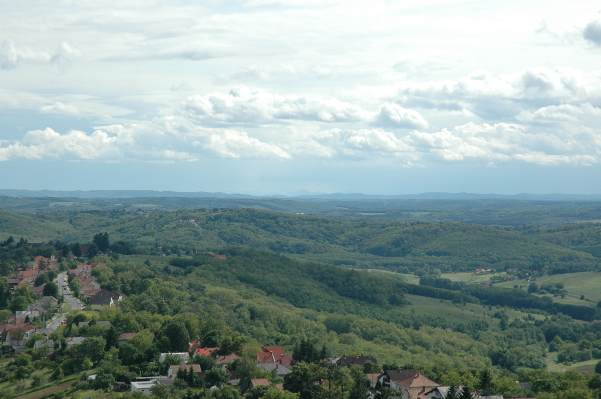 A Zalai-dombság. Látkép a bazitai TV-toronyból. Fotó: Varga Attila